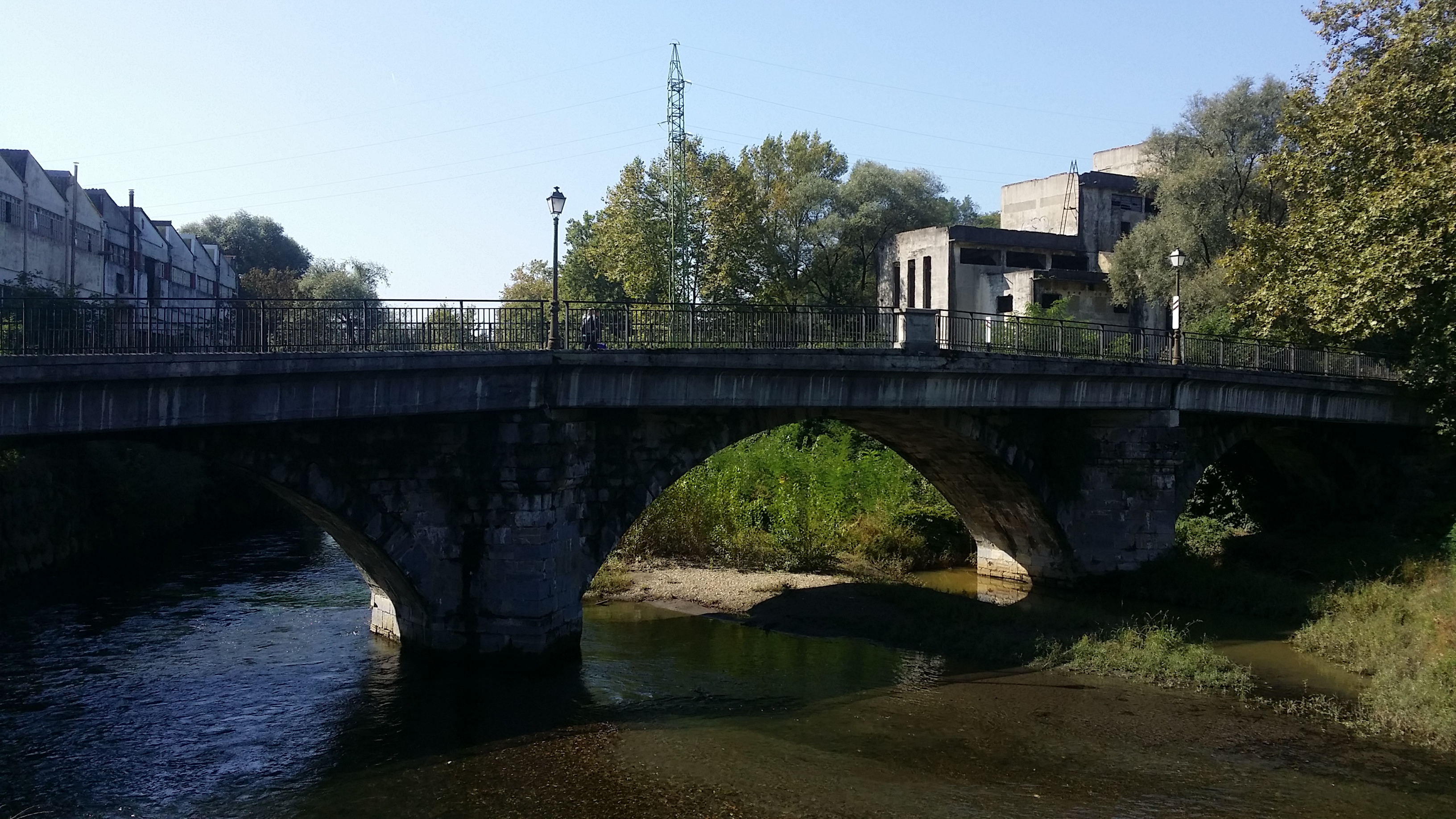 Ergobiko 5